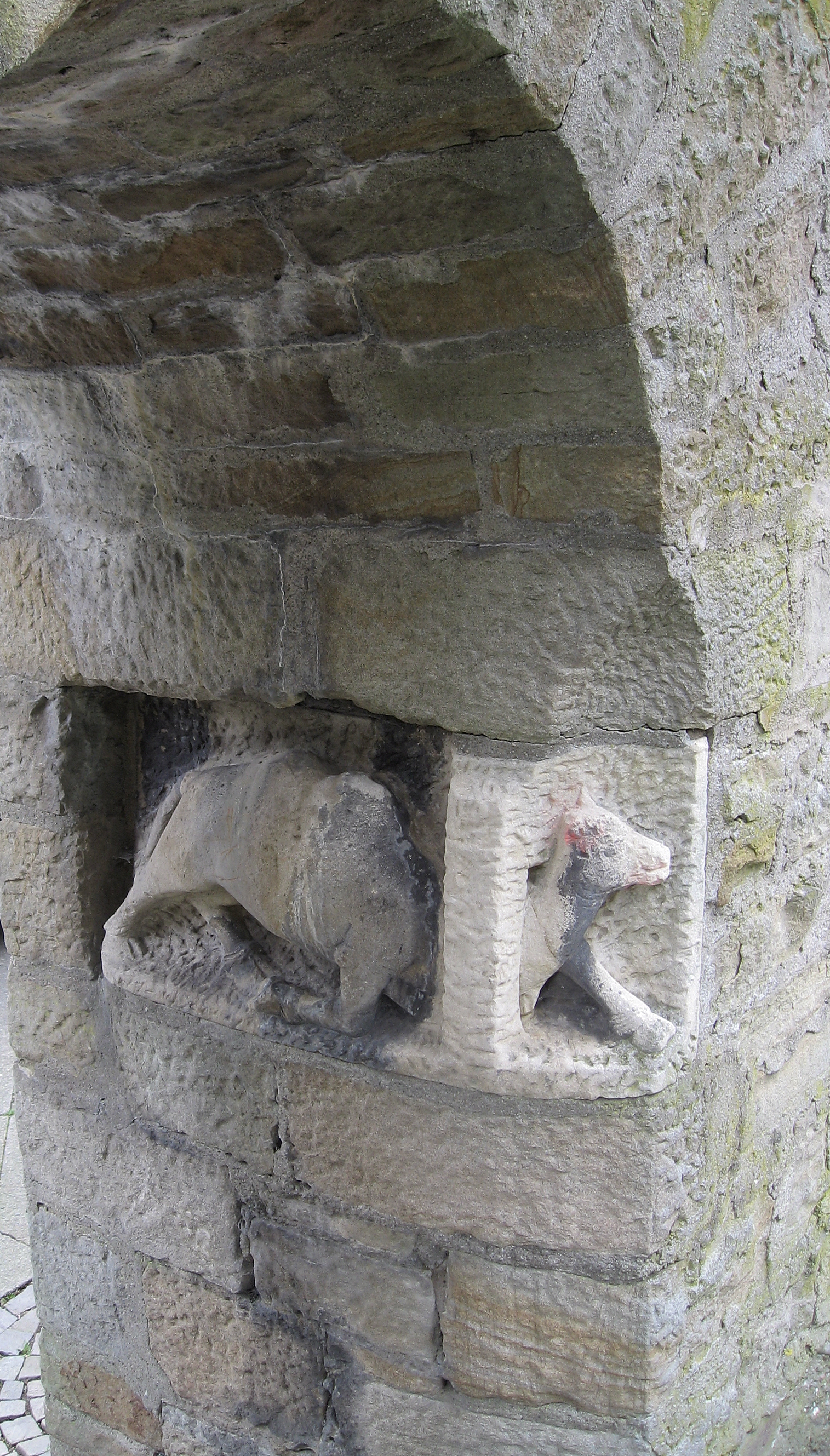 Dortmund, Bonifatius-Kirche, Eingang zum westlichen Kirchplatz „Es ist leichter, dass ein Kamel durch ein Nadelöhr gehe, als dass ein Reicher ins Reich Gottes komme.“; Mk 10:24; ähnlich: Lk 18:25 & Mt 19:24